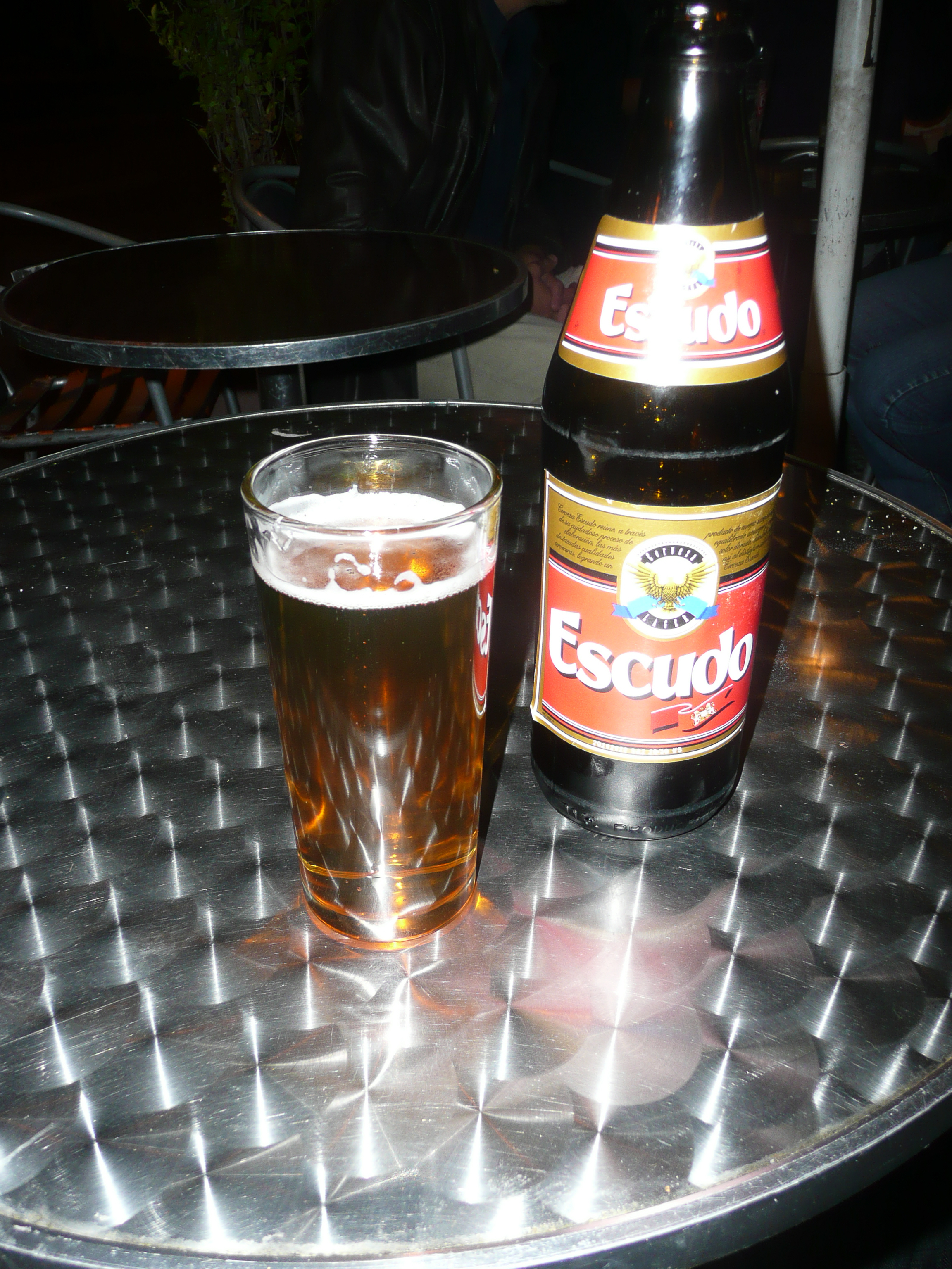 escudo beer